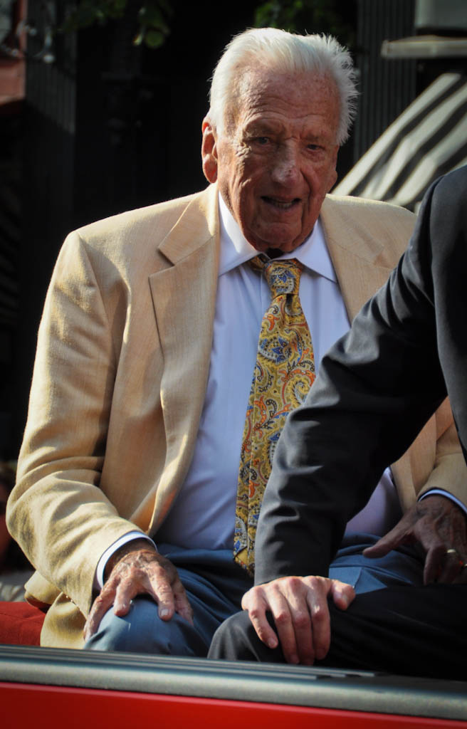 Ralph Kiner